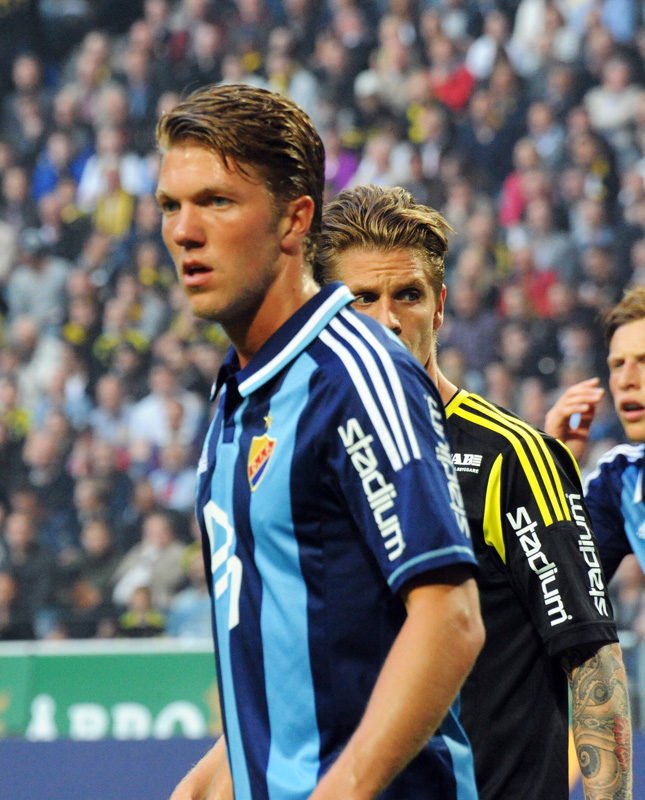 Djurgårdens IF Player Martin Broberg.